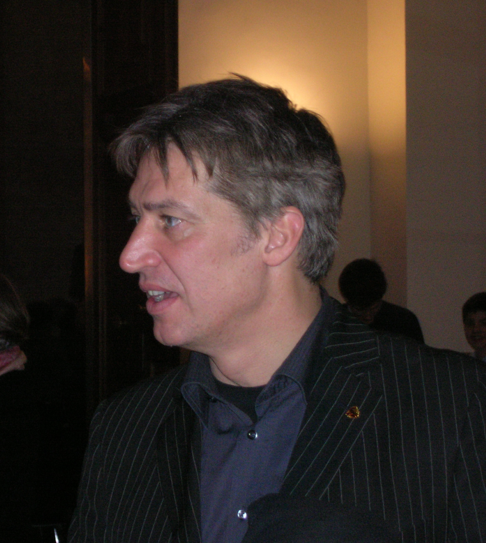 Tobias Moretti, österreichischer Schauspieler, im Österreichischen Theatermuseum anlässlich der Veranstaltung König Ottokars Glück und Ende 1955-2005, Eine Gegenüberstellung, 26. Jänner 2007